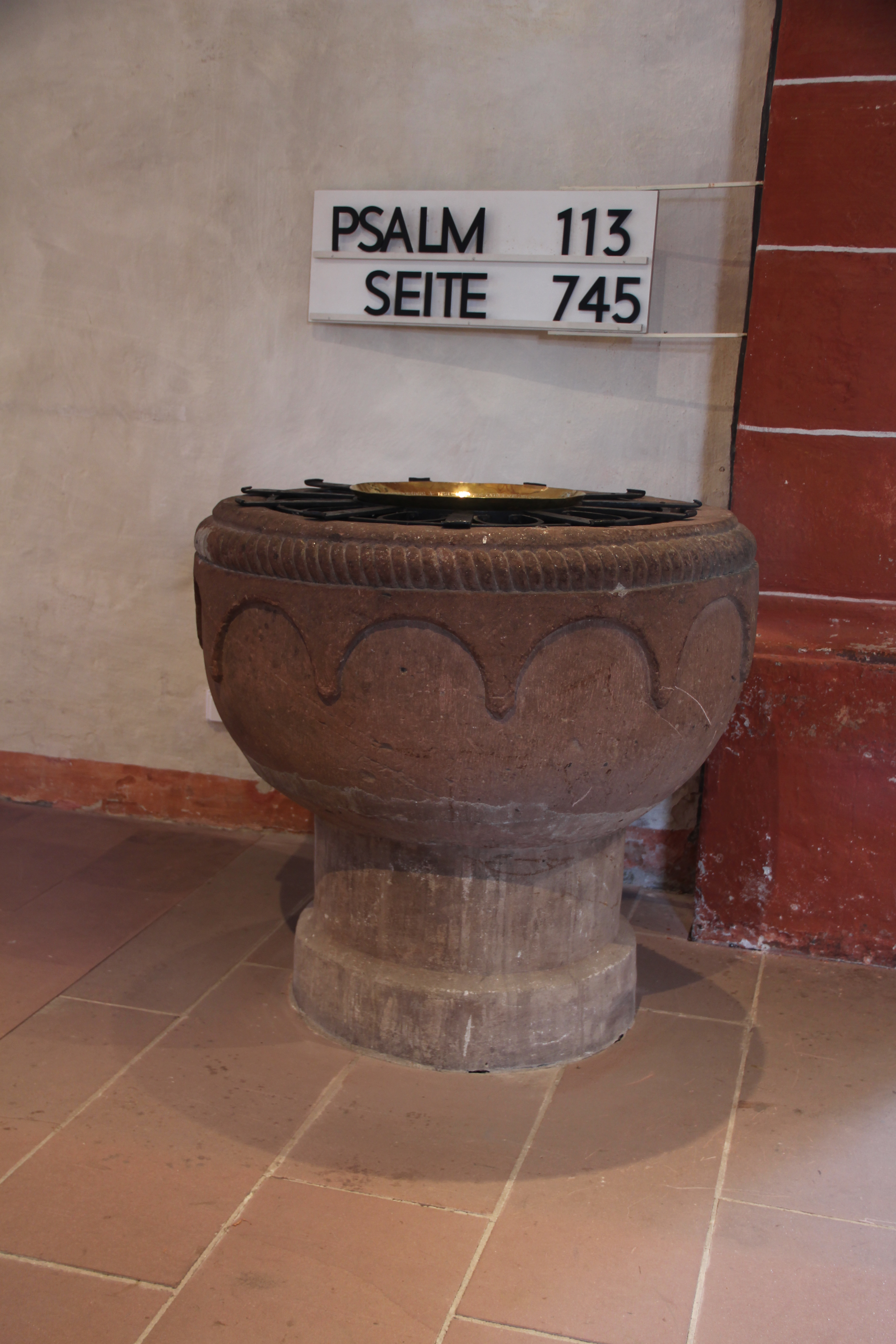 Innenaufnahme Martinskirche Gladenbach